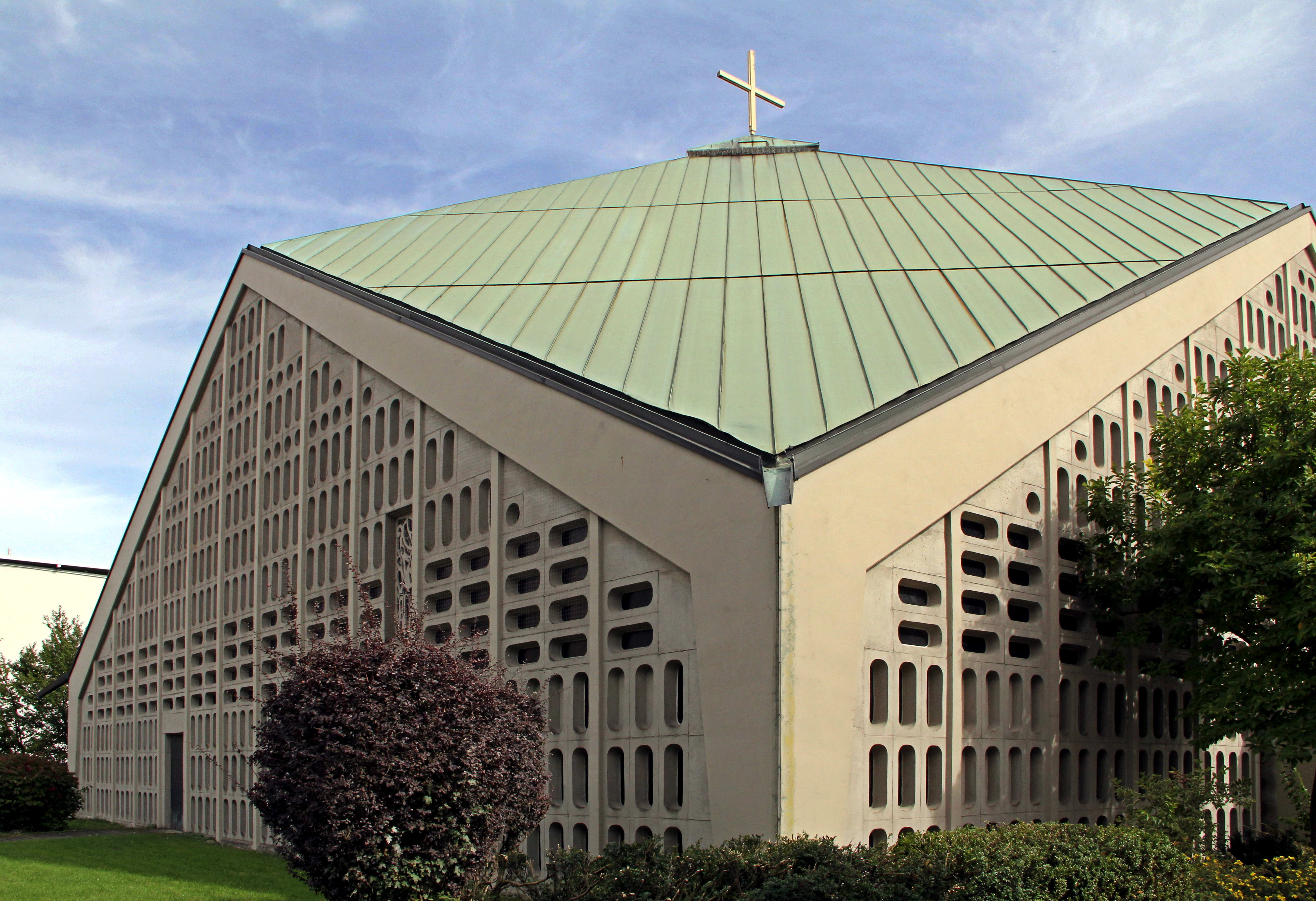 Ingolstadt, Pettenkoferstraße 12. Kath. Pfarrkirche St. Augustin mit Gemeindezentrum, von Hans Zitzelsperger, 1957-59: Kirche als Hallenraum über quadratischem Grundriss mit durch vier rautenförmige Dachflächen gebildetem Zeltdach, Traggerüst aus Zweigelenkrahmen und Wandscheiben aus Betonfertigteilen mit runden und schlitzförmigen Lichtöffnungen, seitlich angeschobene Seitenkapelle; mit Ausstattung; Pfarrhaus mit Gemeindesaal, über Zwischenbau an die Seitenkapelle quer angeschlossener, langgestreckter zweigeschossiger Sichtziegelbau mit Flachdach; Glockenturm, freistehendes und vierkantiges, sich verjüngendes Stahlbetongerüst mit Ziegelausfachung.This is a photograph of an architectural monument.